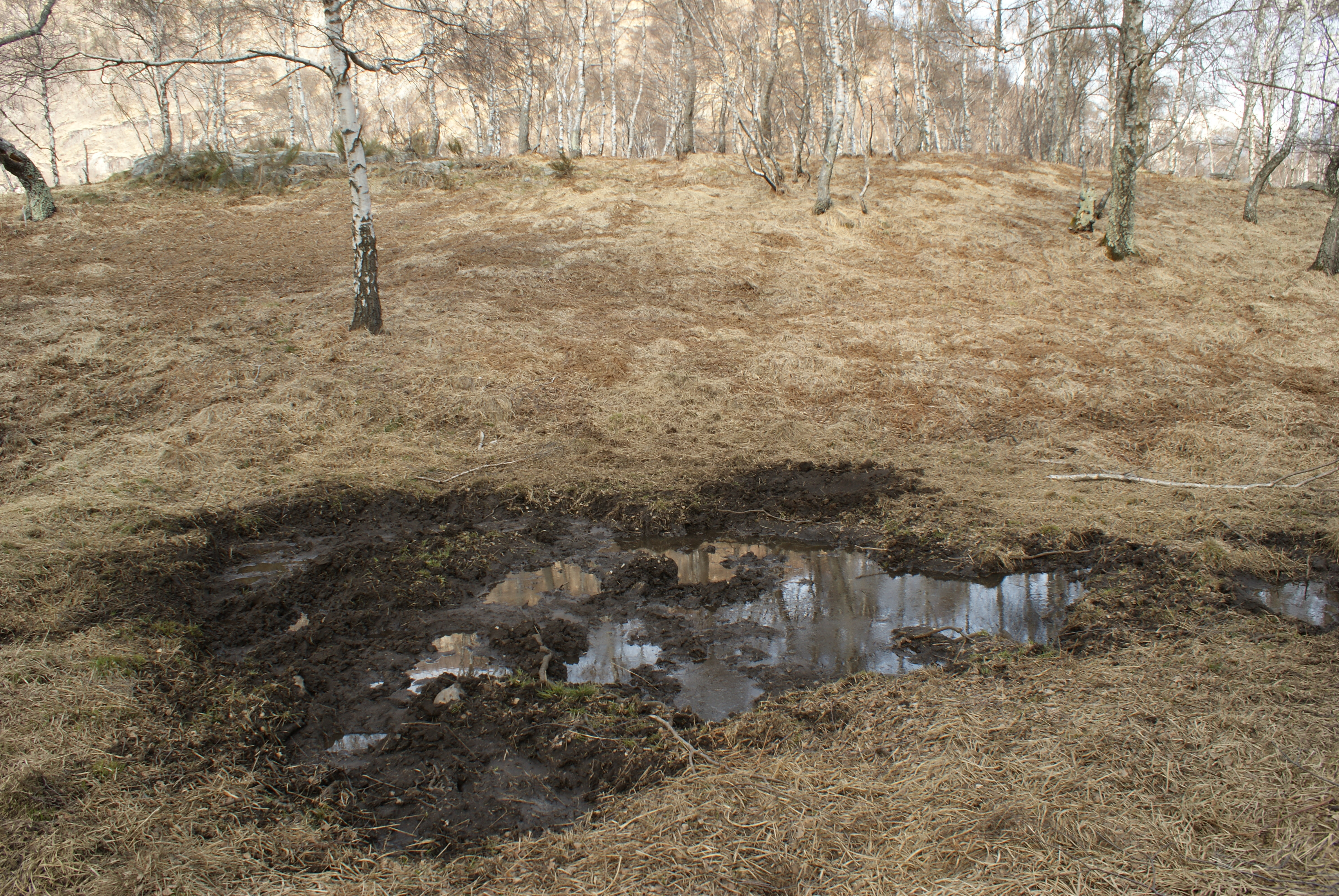 Das Bild zeigt eine Suhle von Wildschweinen bei Nebi in der Gemeinde Terre di Pedemonte, Kanton Tessin, Schweiz.